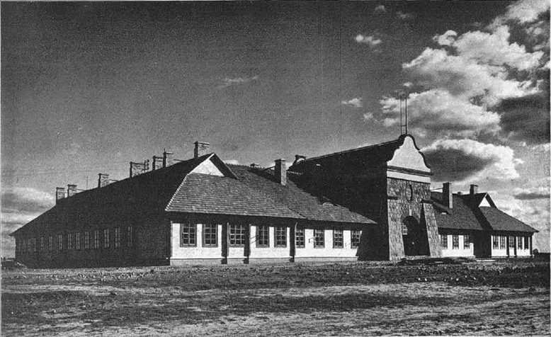 Клецкія казармы